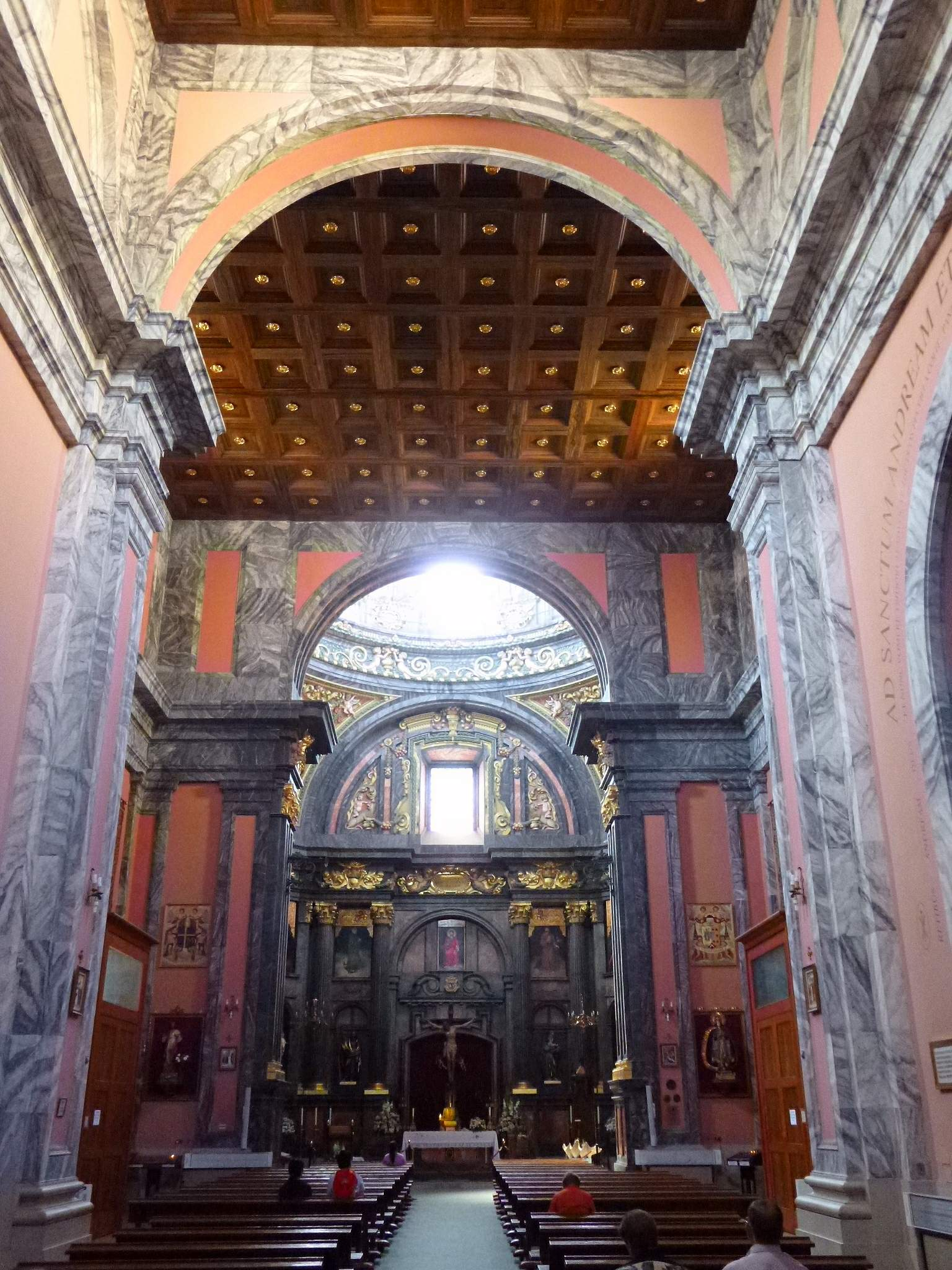 Iglesia de San Andrés (Madrid)